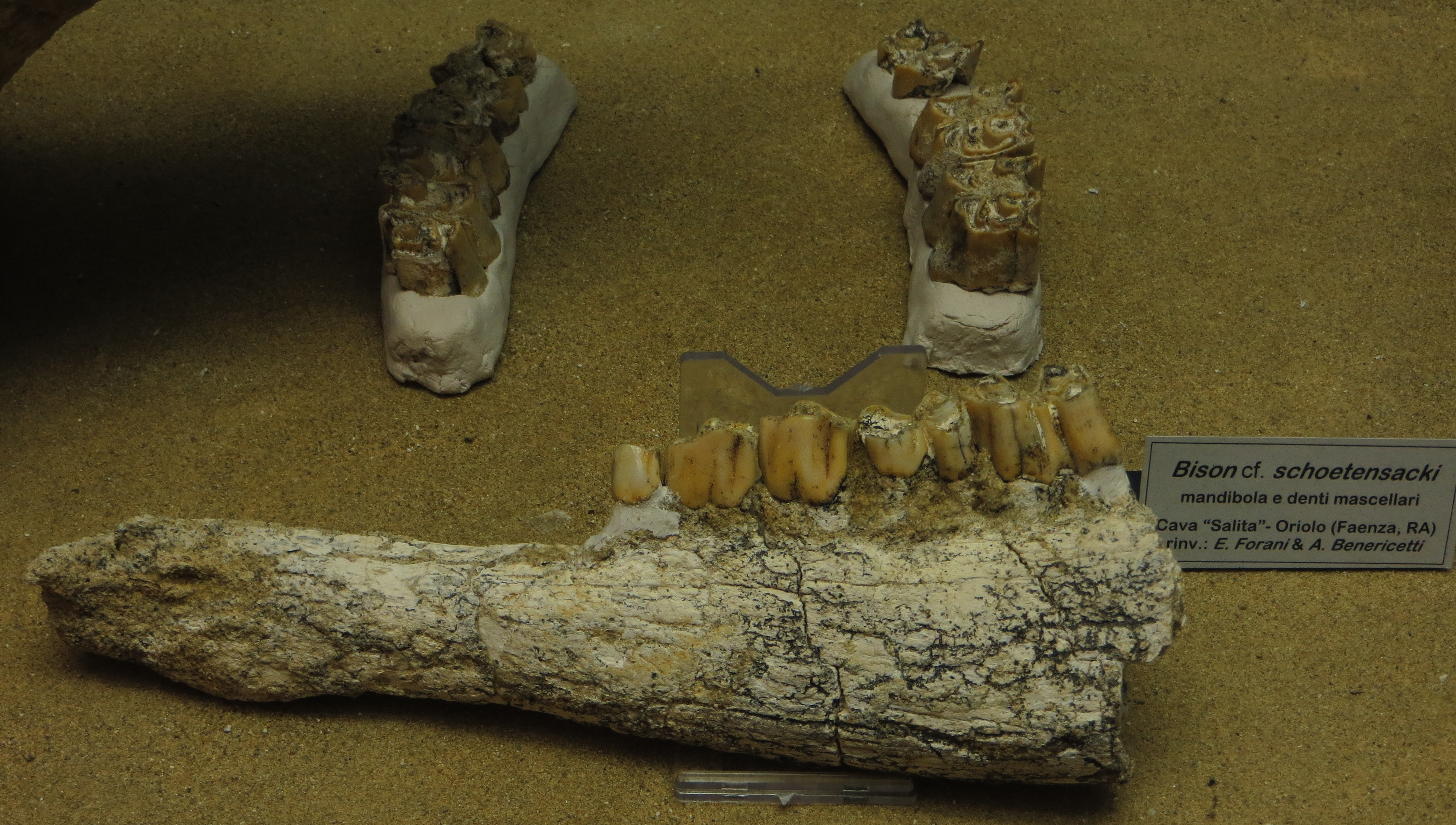 Fossil - took the picture at Museo Scienze Naturali di Faenza